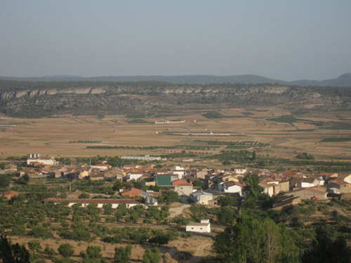 Vista de Camp de Dalt.